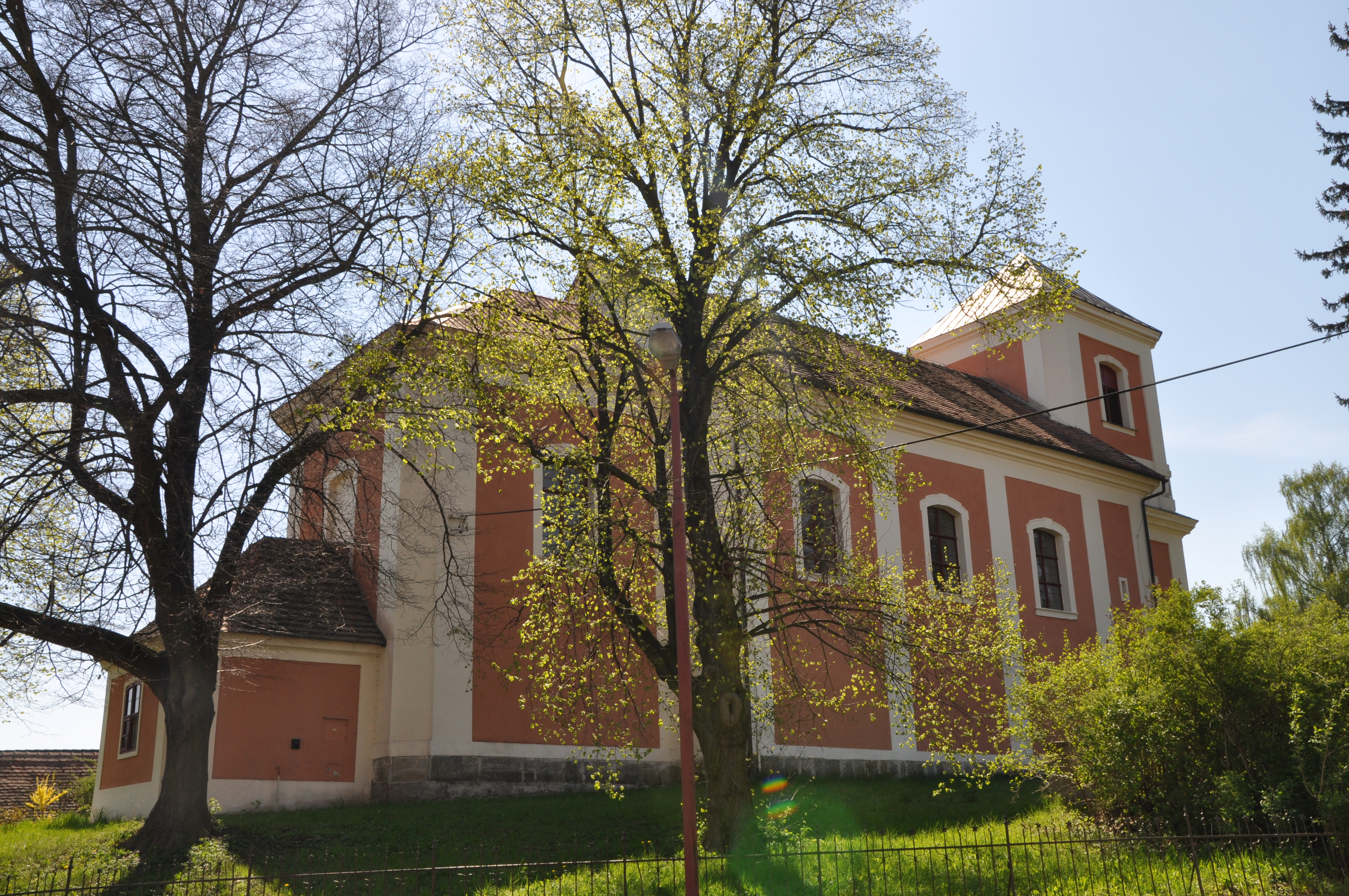 Kostel sv. Michala v Trojovicích, okres Chrudim